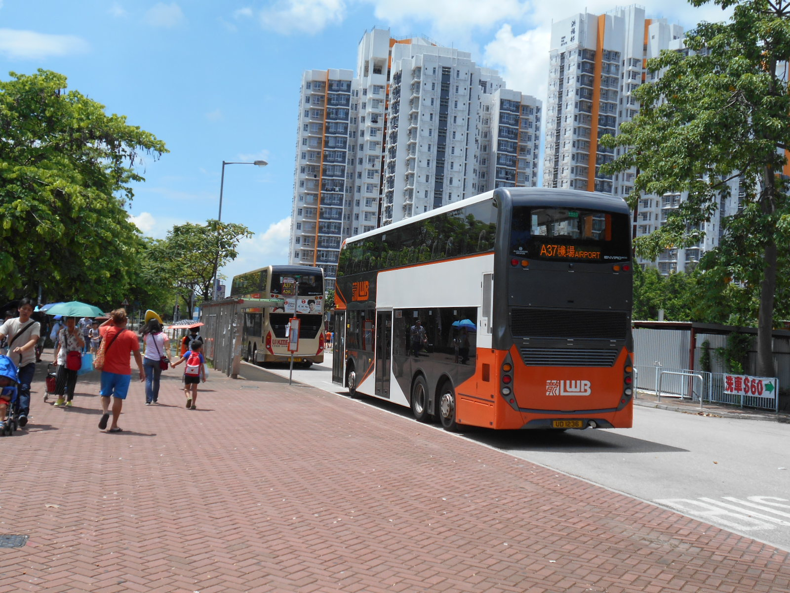 中文（香港）: 洪水橋洪元路巴士總站(2016年7月)